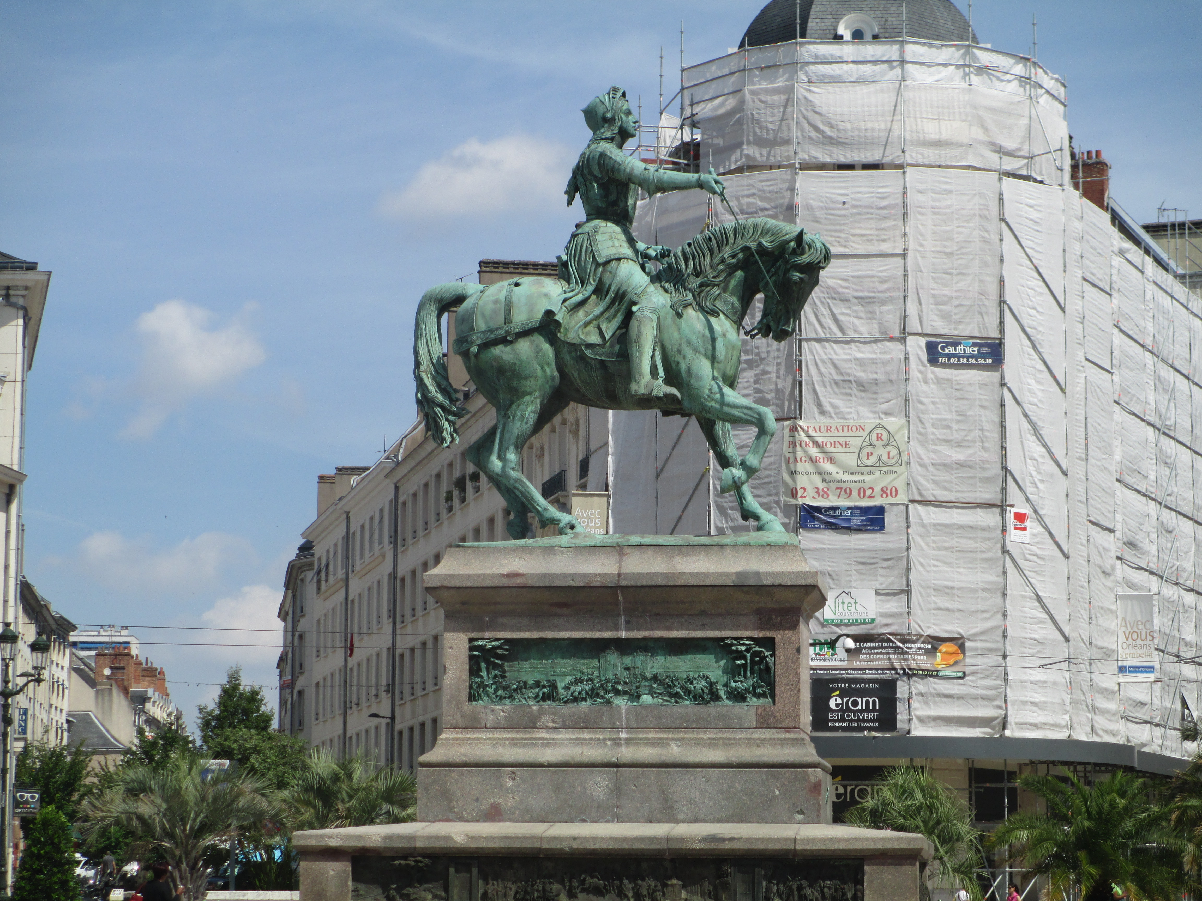 פסל של ז'אן ד'ארק בעיר אורליאן